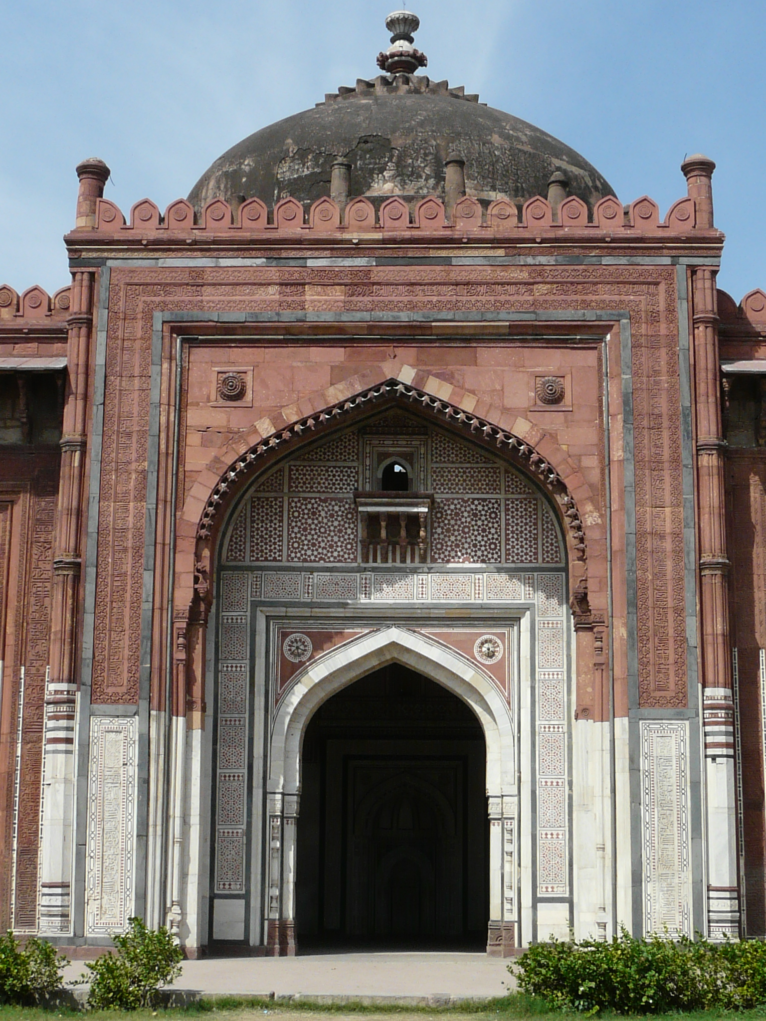 Central iwan of Qila-i-Kuhna mosque, Purana Qila